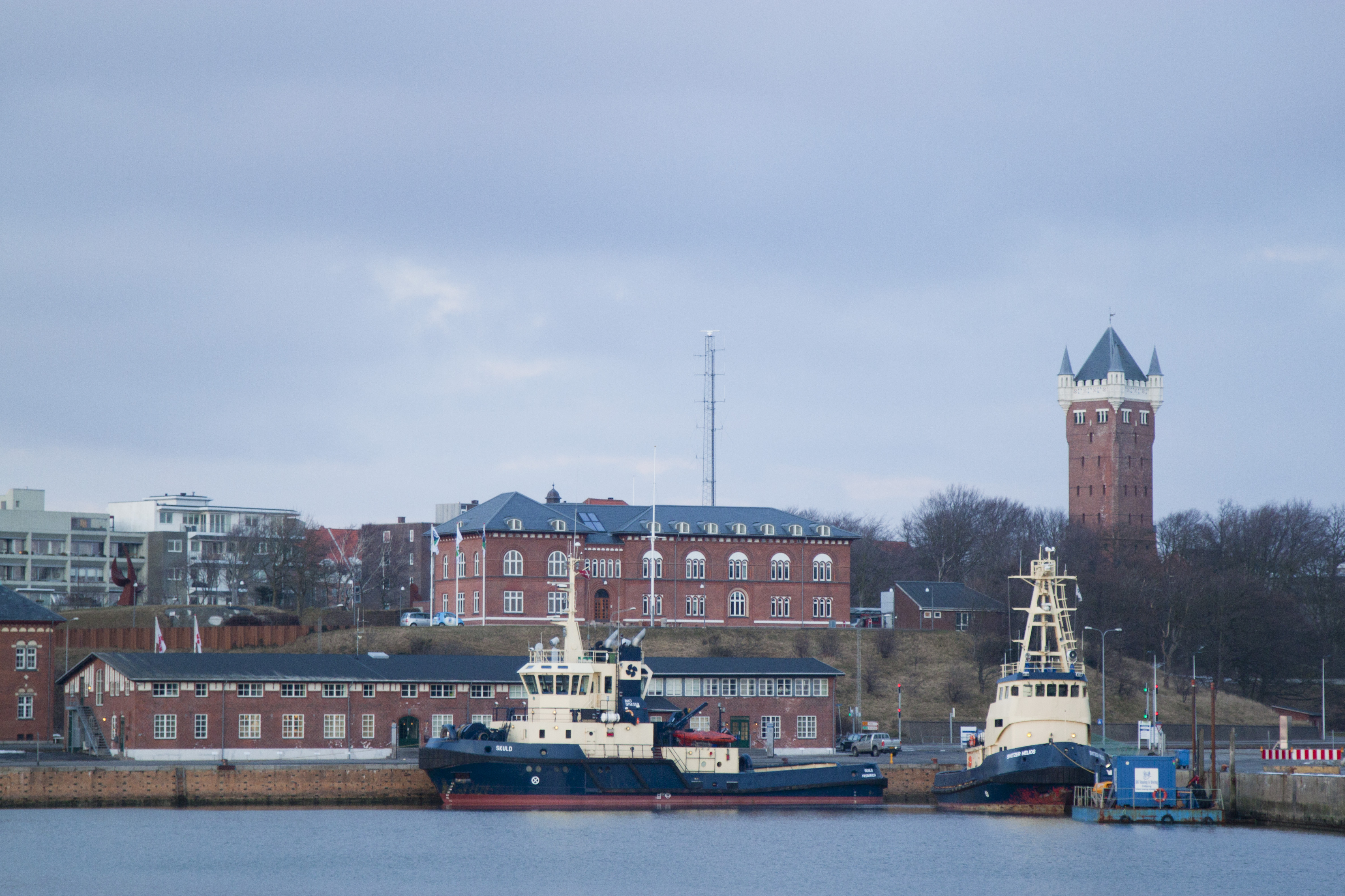 In Esbjerg.